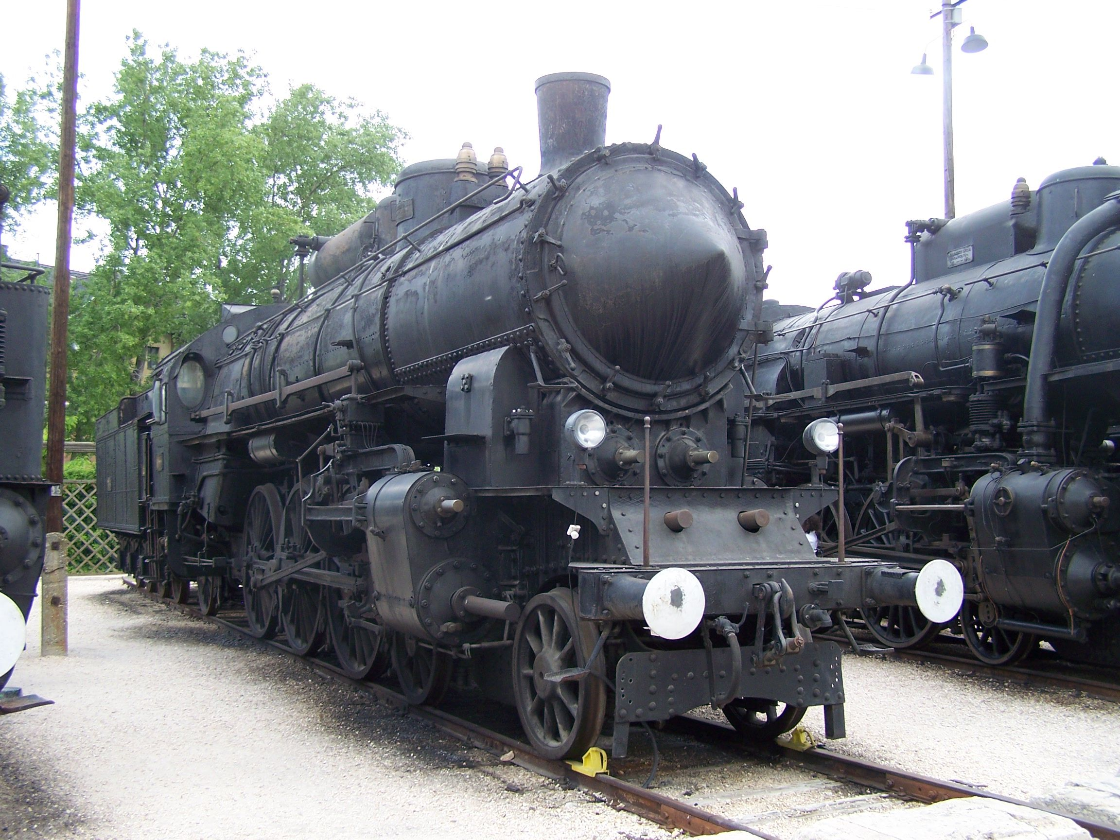 MÁV 301 a Füsti vasúttörténeti parkban